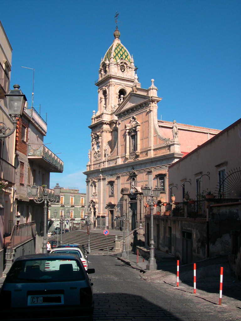 Basilica di Santa Maria dell'elemosina, chiesa Matrice di Biancavilla. Architetto Carlo Sada. Foto di Archenzo